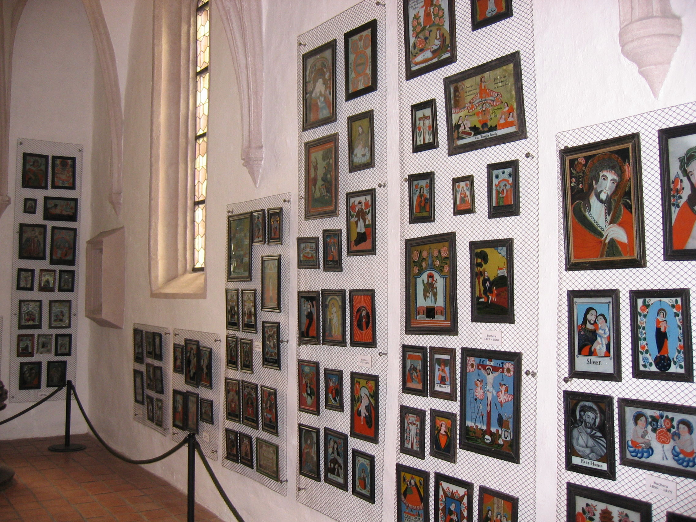 Hinterglasbilder - Museumsbestand